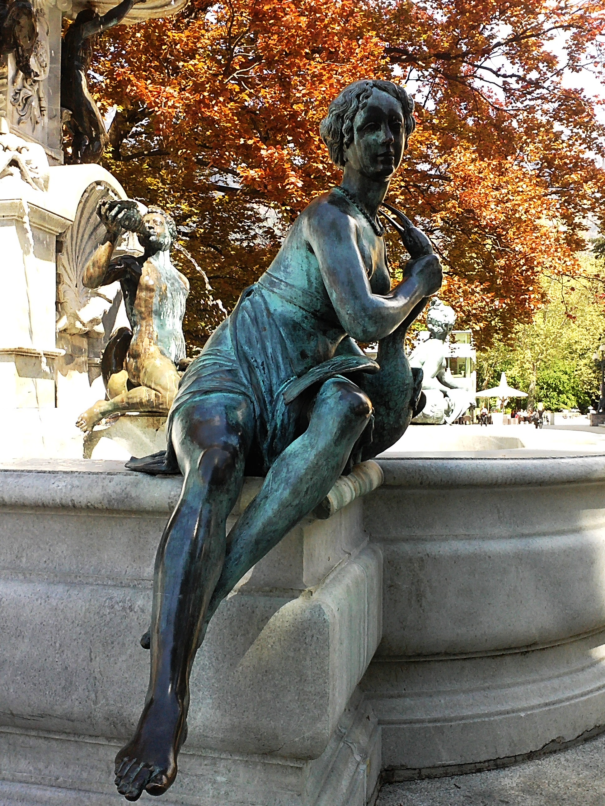 Figur am Leopoldsbrunnen in Innsbruck